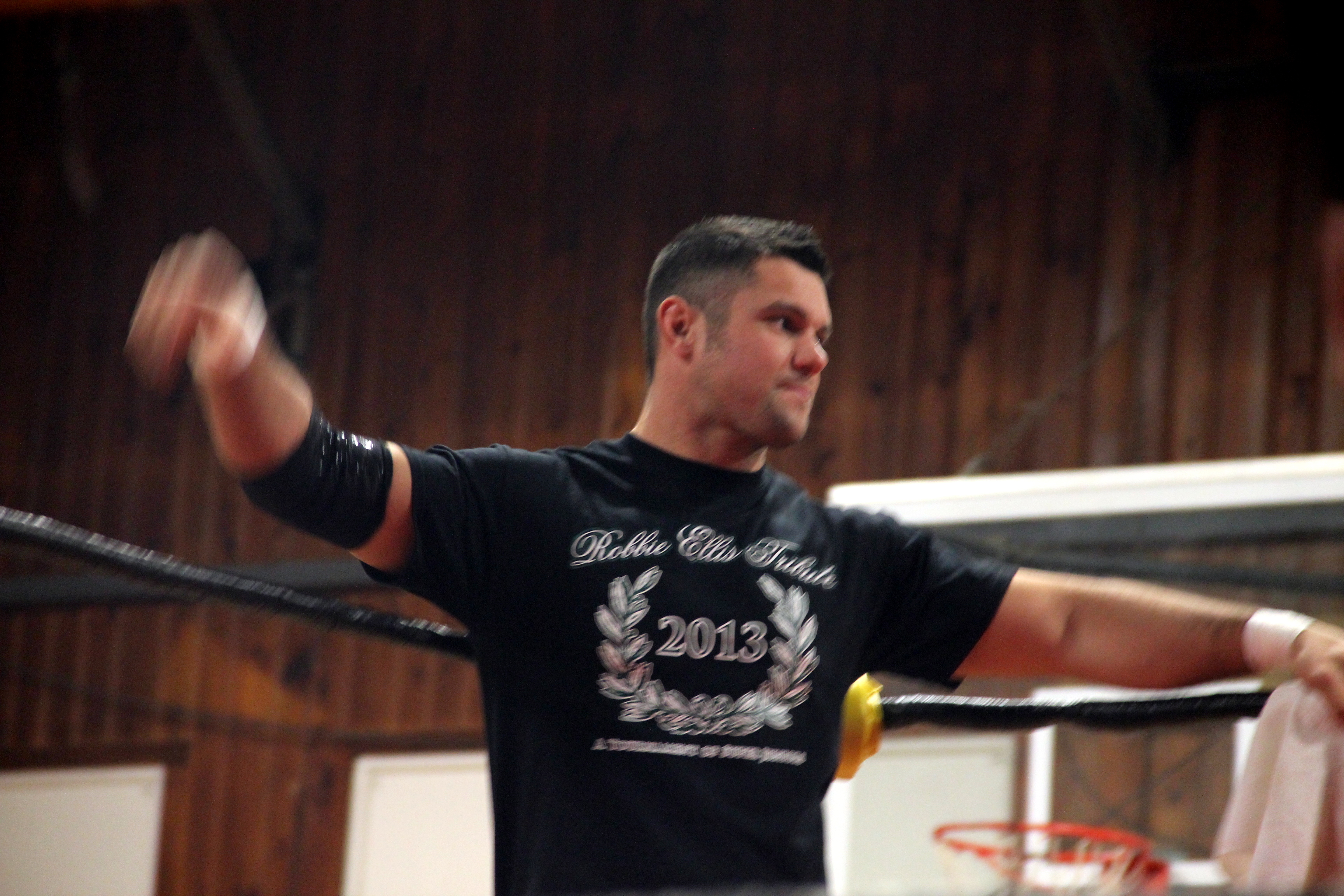 eddie in an indy event